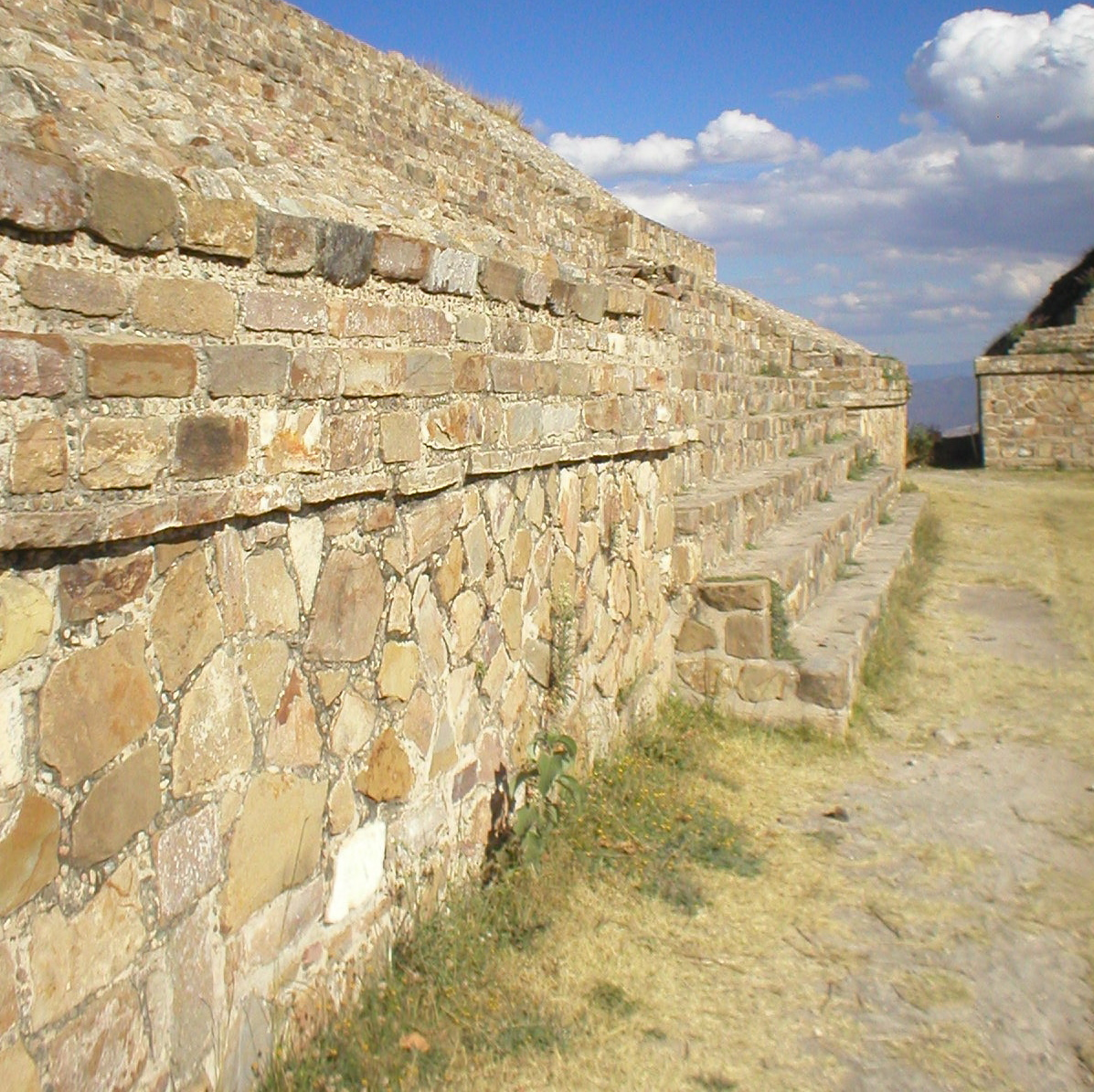 Monte Albán.